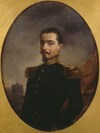 Luciano Manara, olio su tavola, cm 118 x 90, Museo del Risorgimento, Milano